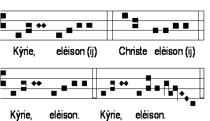 Kyrie 16